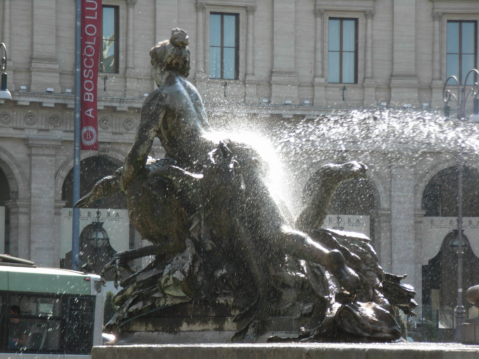 Fountain Repubblica Roma